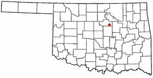 werrewrewrewrewrqwerer